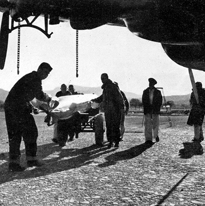 Savoia-Marchetti SM.79 durante la IIWW